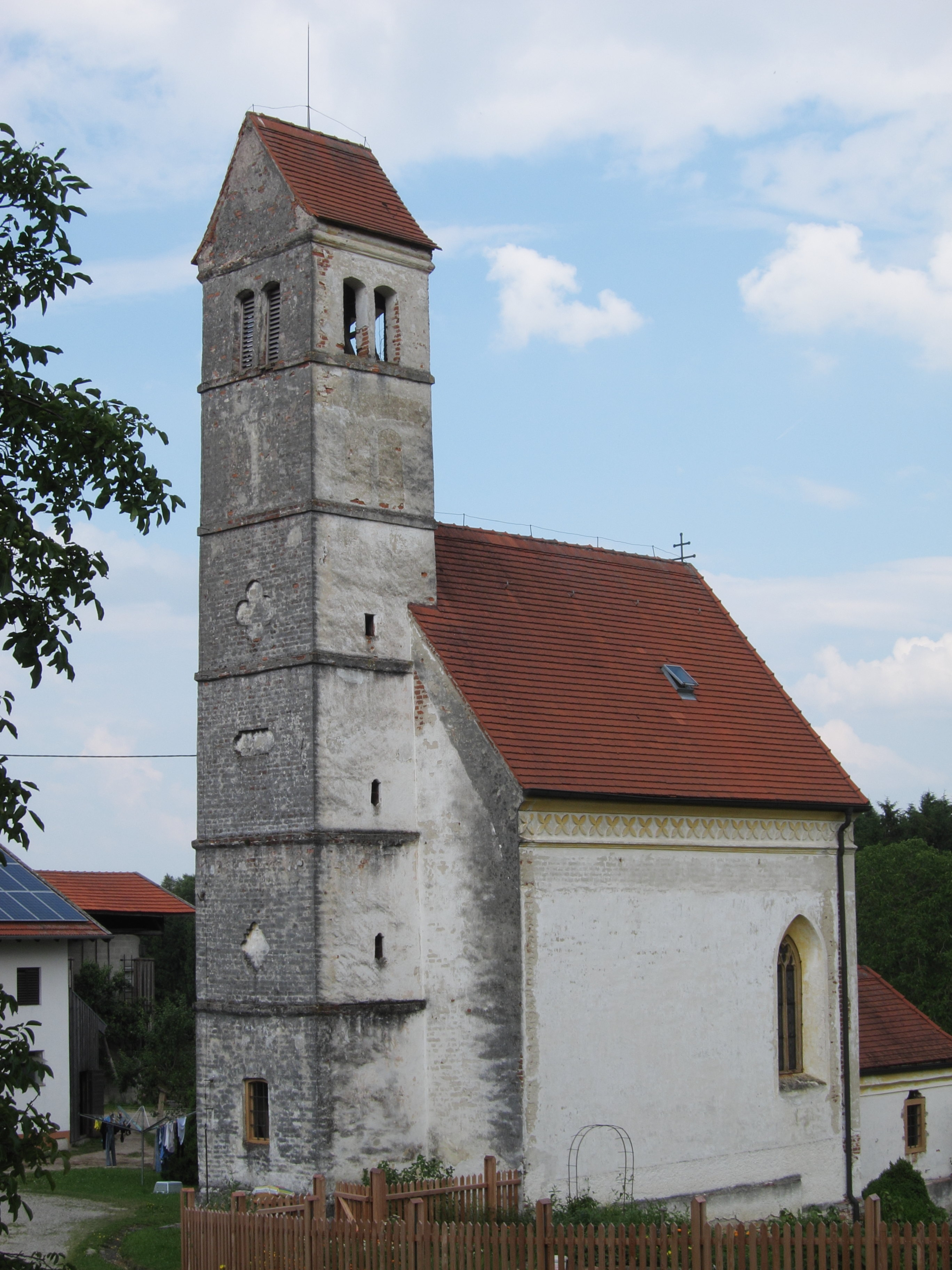 Sankt Colomann; katholische Filialkirche St. Kolomann; gedrungener Saalbau mit angefügter Sakristei und Westturm, zweite Hälfte 15. Jahrhundert, Turm 1678.